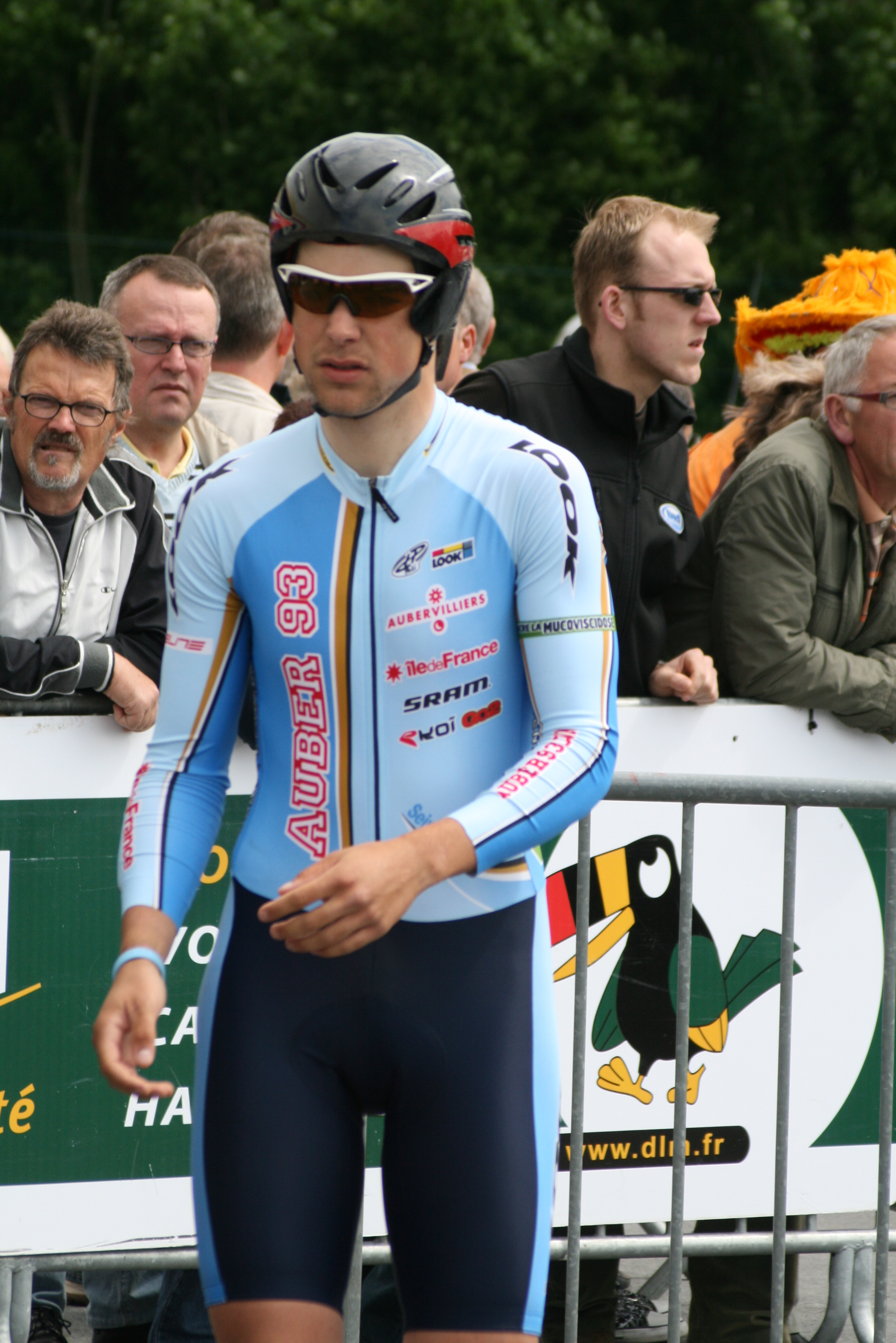 Tony Gallopin, durant les Quatre jours de Dunkerque 2009, à Douai